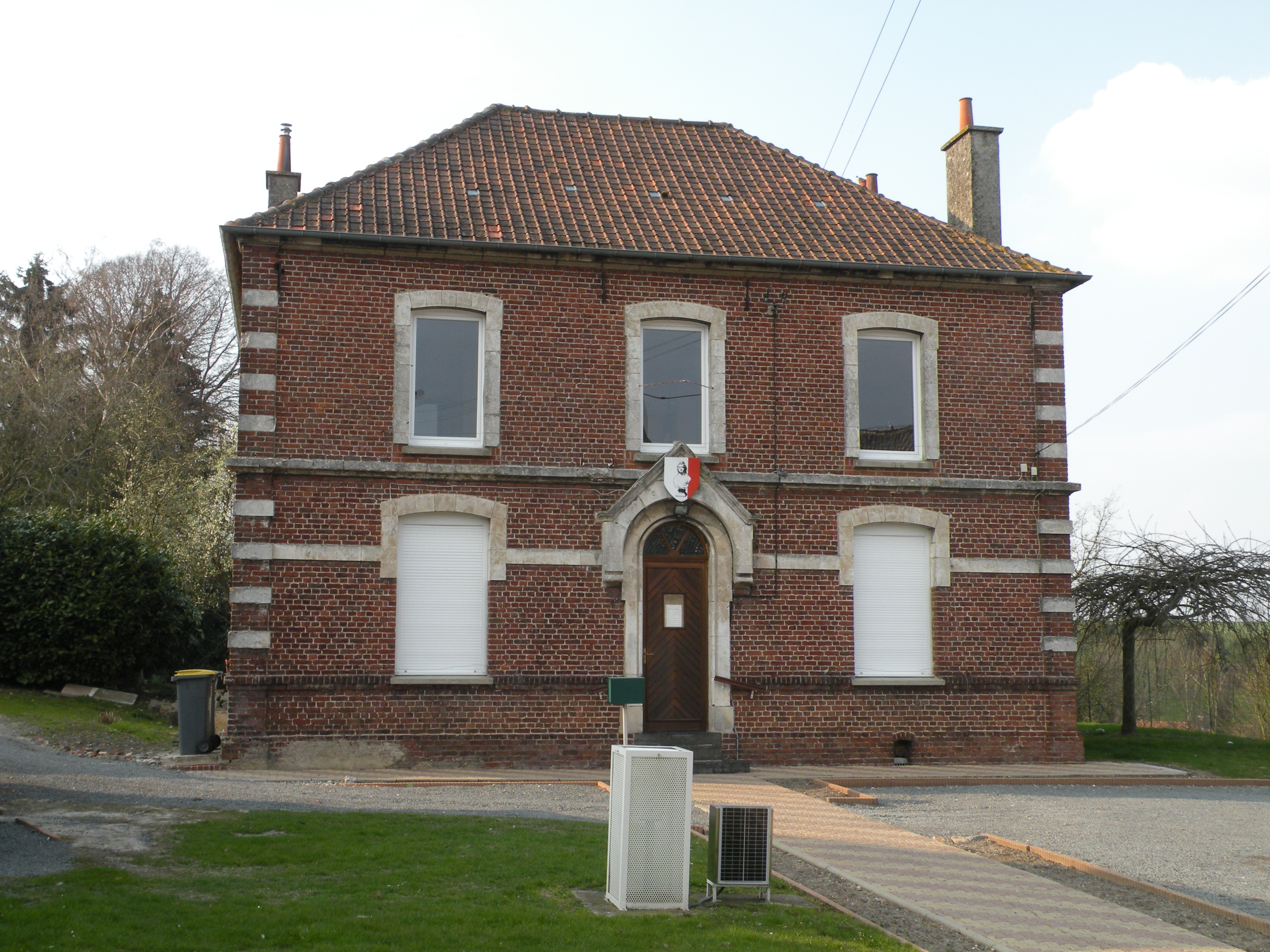 Mairie d'Ourton.